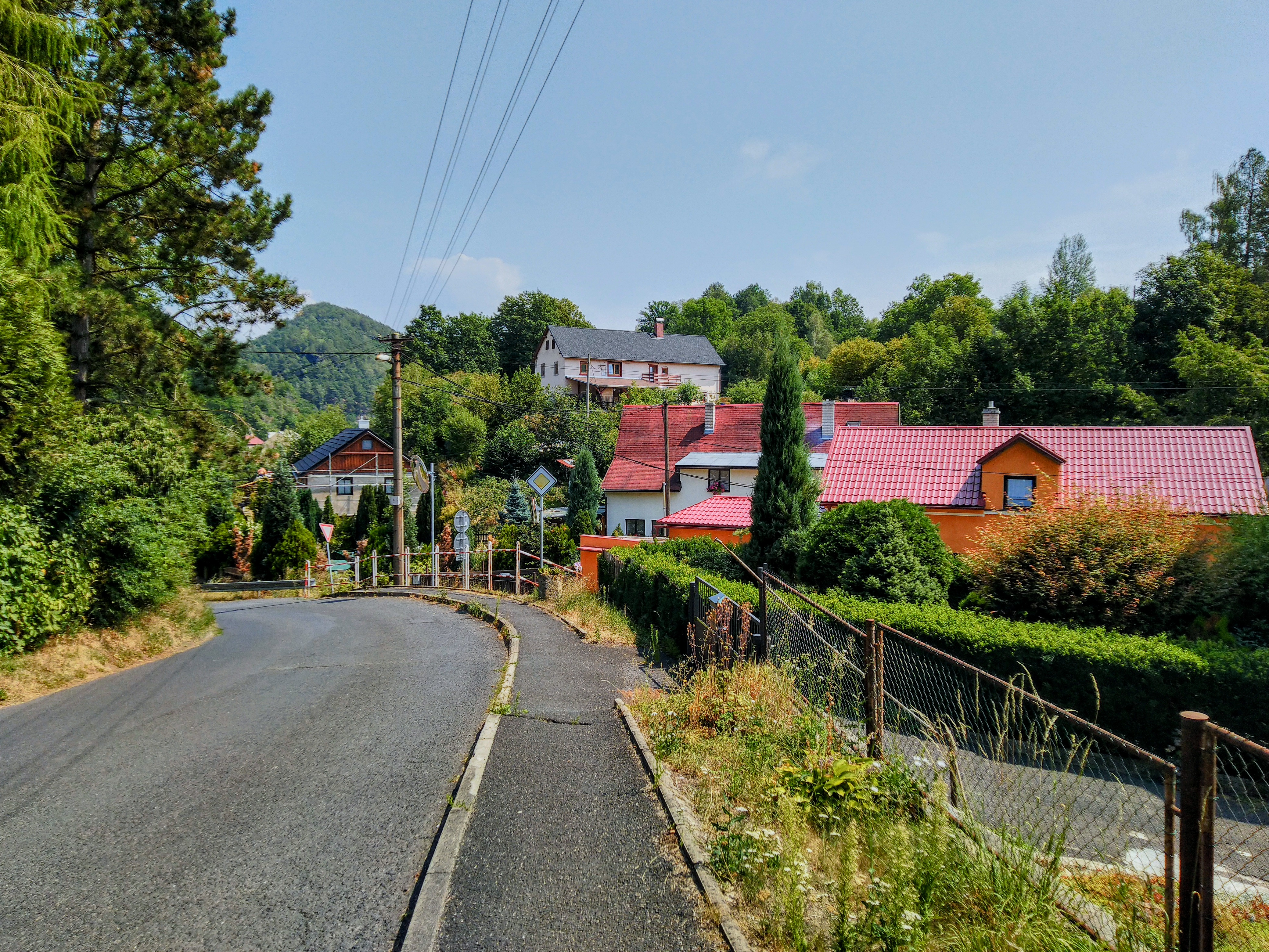 Děčín-Dolní Oldřichov, pohled z Oldřichovské ulice na severozápad.